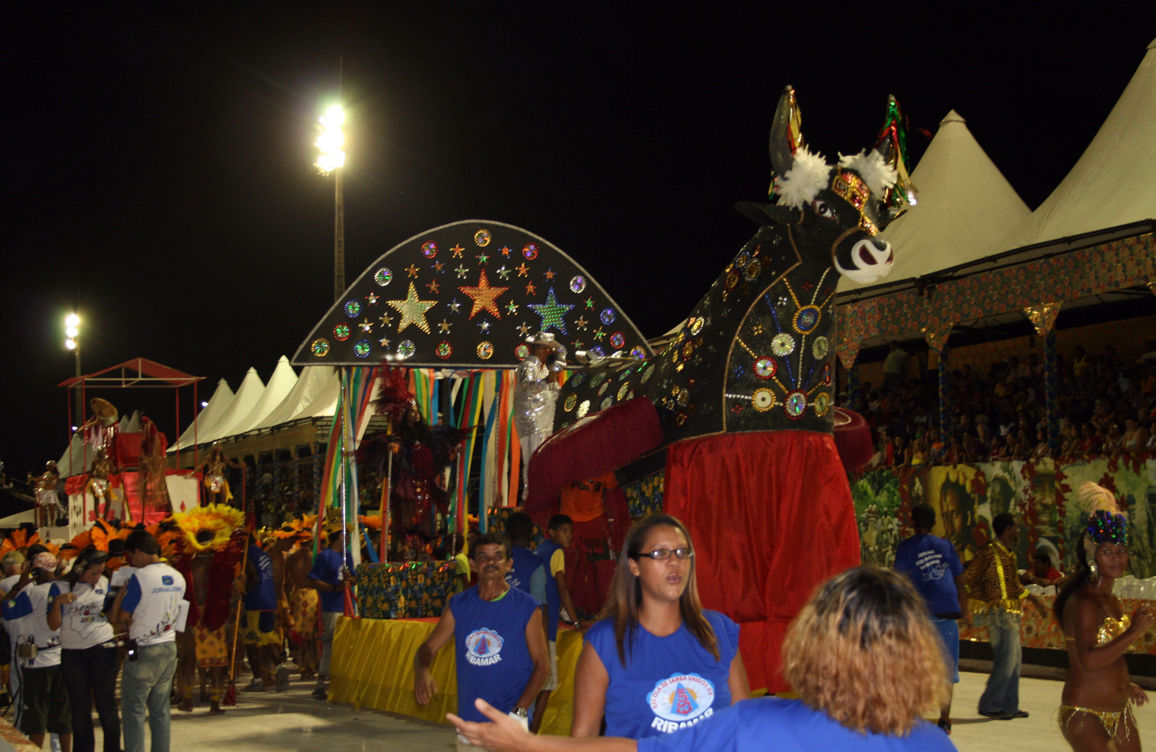 São Luís (Maranhão) Bumba-Boi Carnaval 2008Carnaval 2008 - São Luís